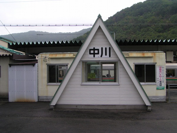 Nakagawa Station, Nan'yō, Yamagata, Japan